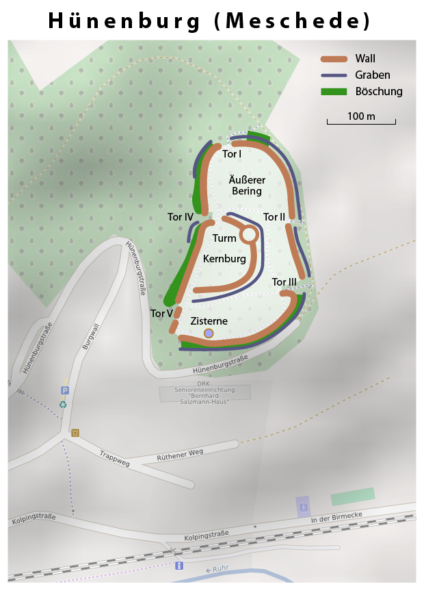 Karte der Hünenburg in Meschede